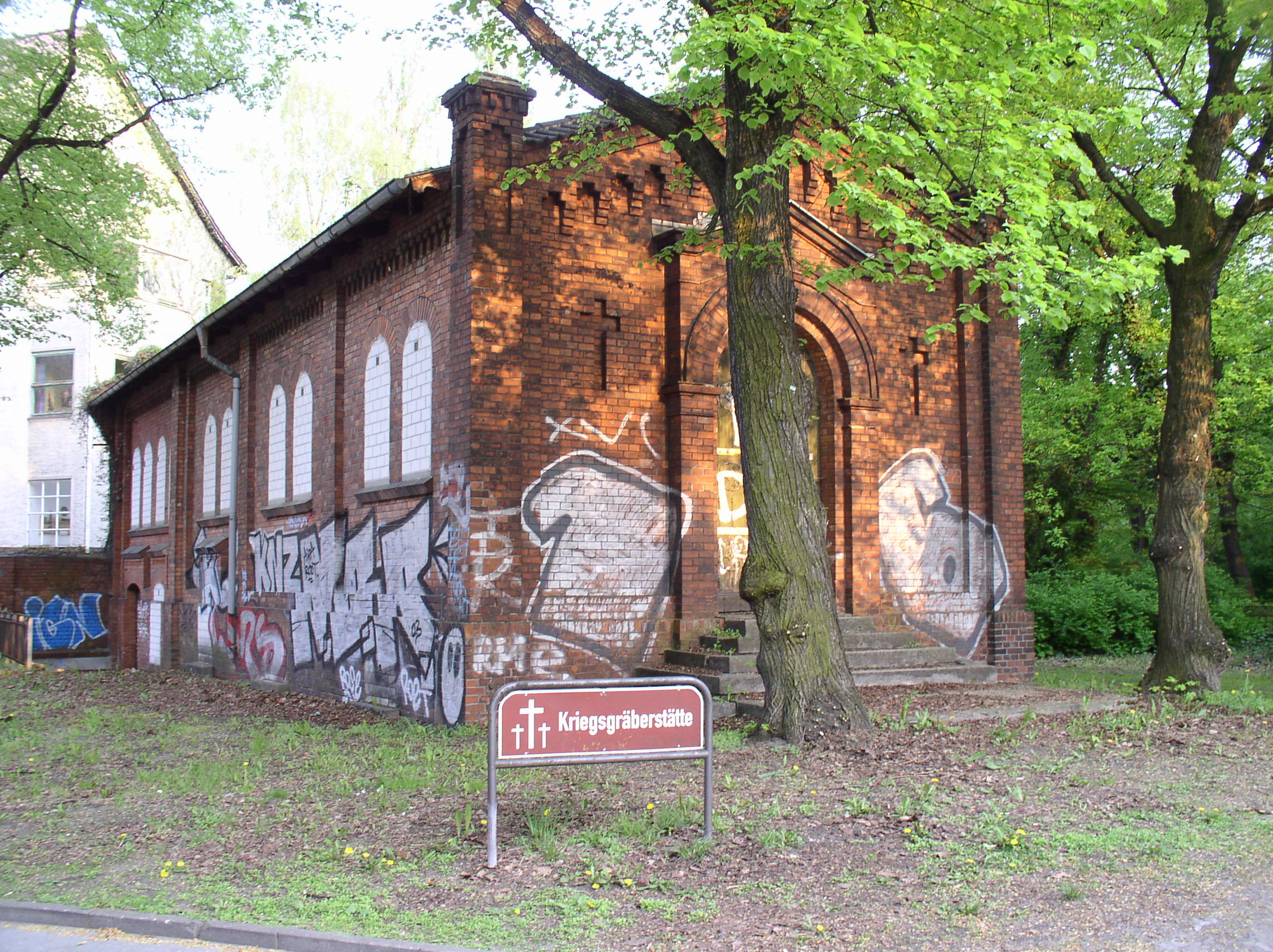 Graveyard Friedhof Rummelsburg at Berlin-Lichtenberg.